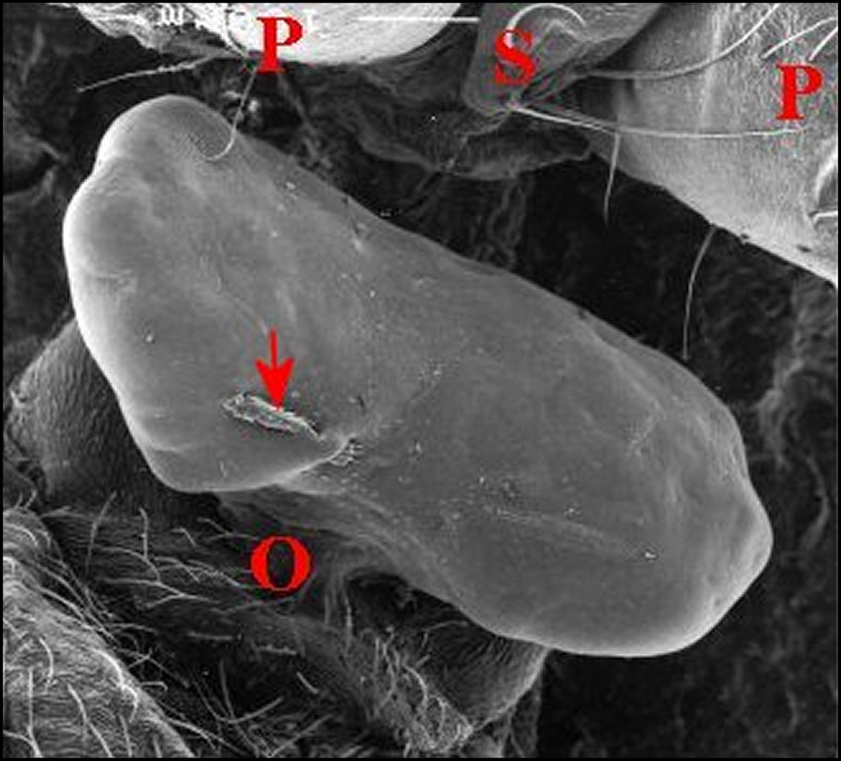 Bouchon d'accouplement vu au microscope à balayage chez Argyrodes cognatus